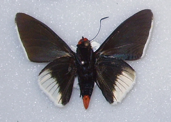 Pyrrhopyge sergius Male, upperside Peru